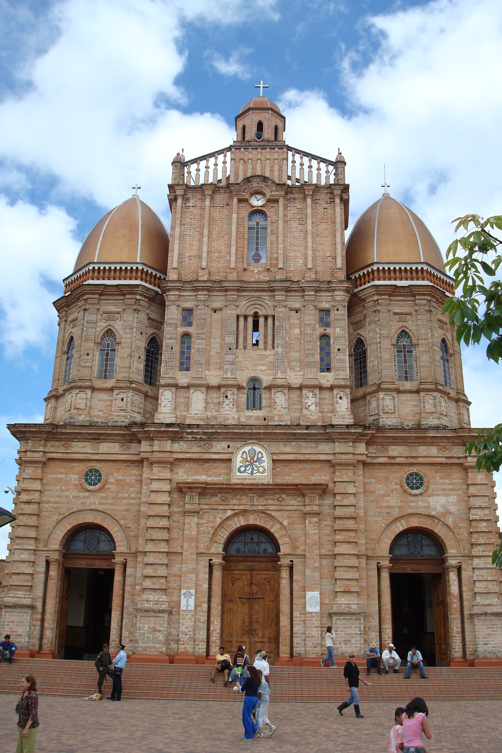 Fachada principal de la Basílica Menor del Señor de los Milagros del municipio de San Pedro de los Milagros, Antioquia. Colombia.